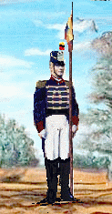 Dessin d'un soldat de l'armée de Bolivar Divison Sud (create by myself)